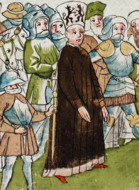 Rosgartenmuseum Konstanz, Hs. 1, Richental: Konzilschronik. In: Feger, Otto (Bearb.): Ulrich Richental: Das Konzil zu Konstanz. Faksimile. Starnberg - Konstanz 1964. Fol. 57v